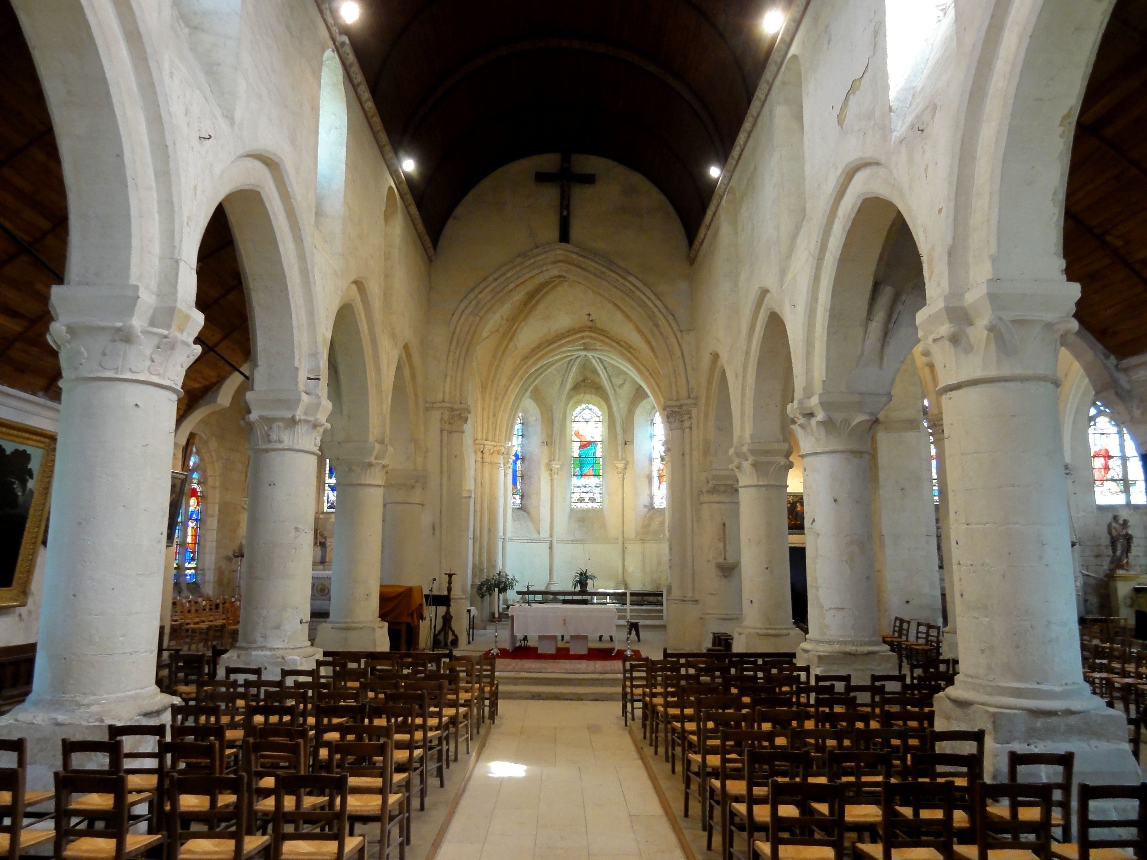 Nef, vue vers l'est.